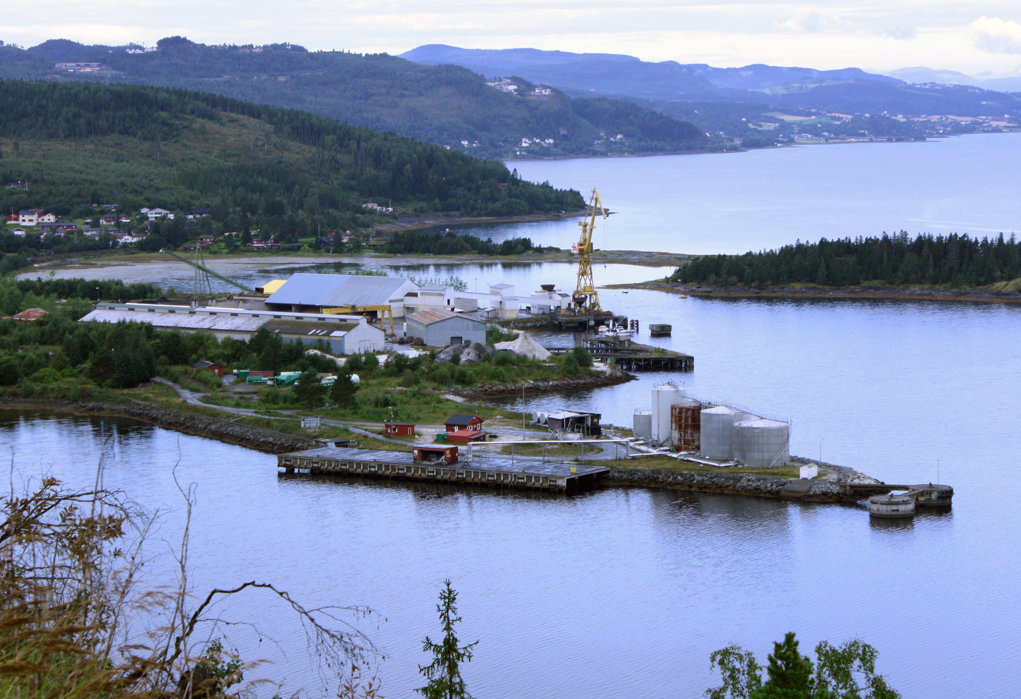 Muruvik er et av alternativene for lokalisering for logistikknutepunkt ved valg av konseptet Integrert Øst.